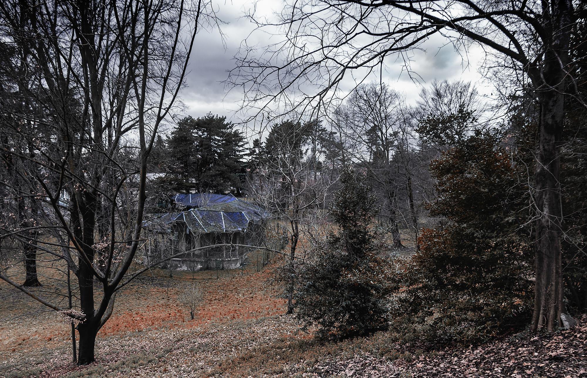 Ex Sanatorio Regina Elena-Legnano This is a photo of a monument which is part of cultural heritage of Italy.